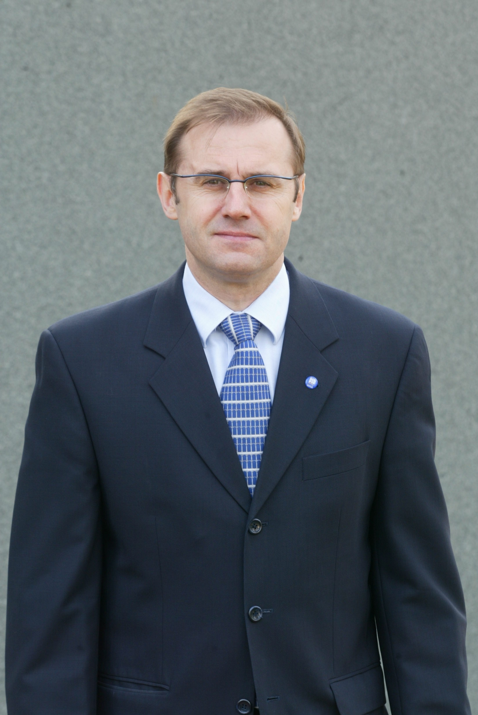 Mirosław Lubarski - Członek Zarządu Grupy PSB